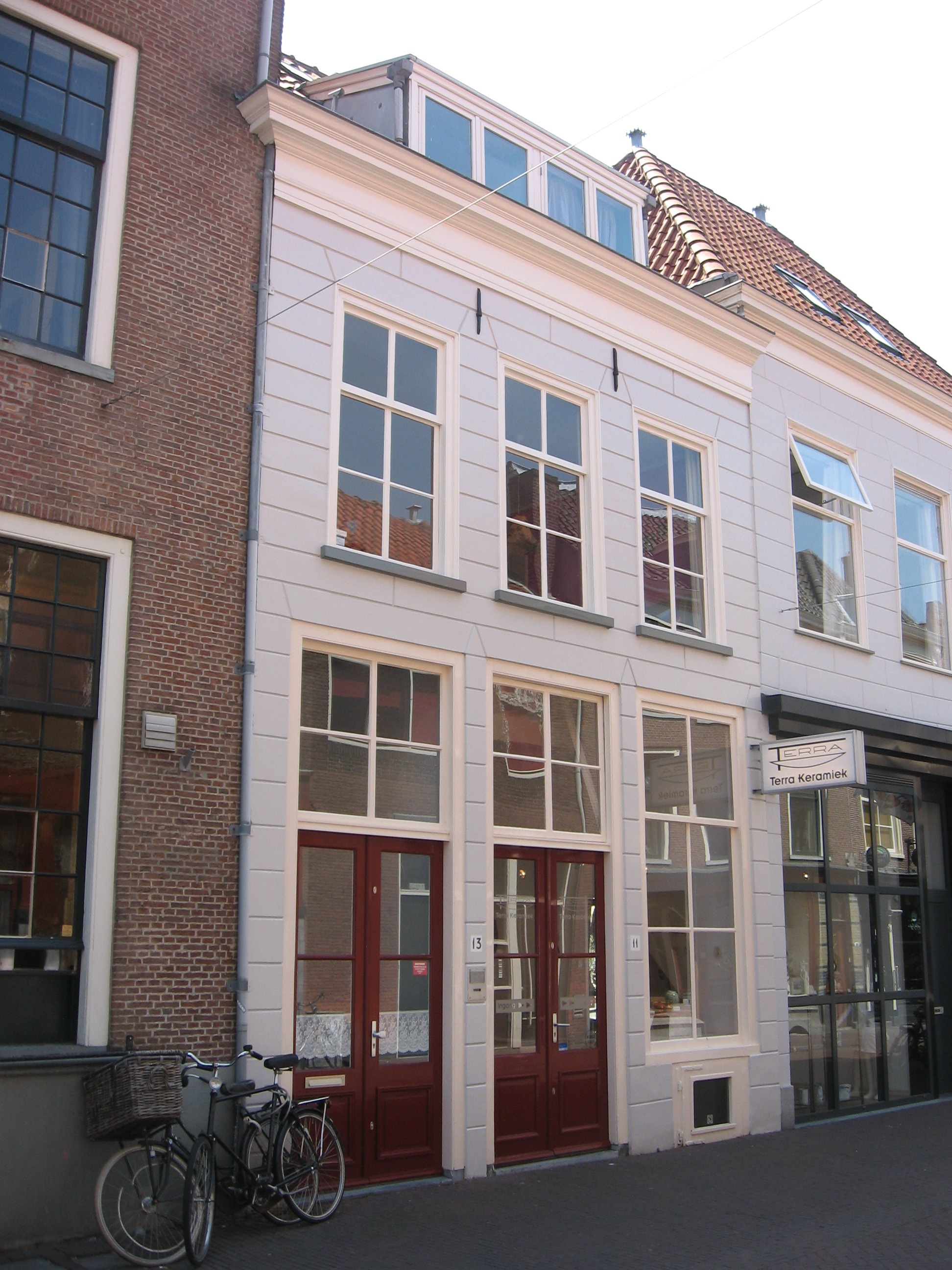 Delft - Nieuwstraat 11-13.jpg, rijksmonument